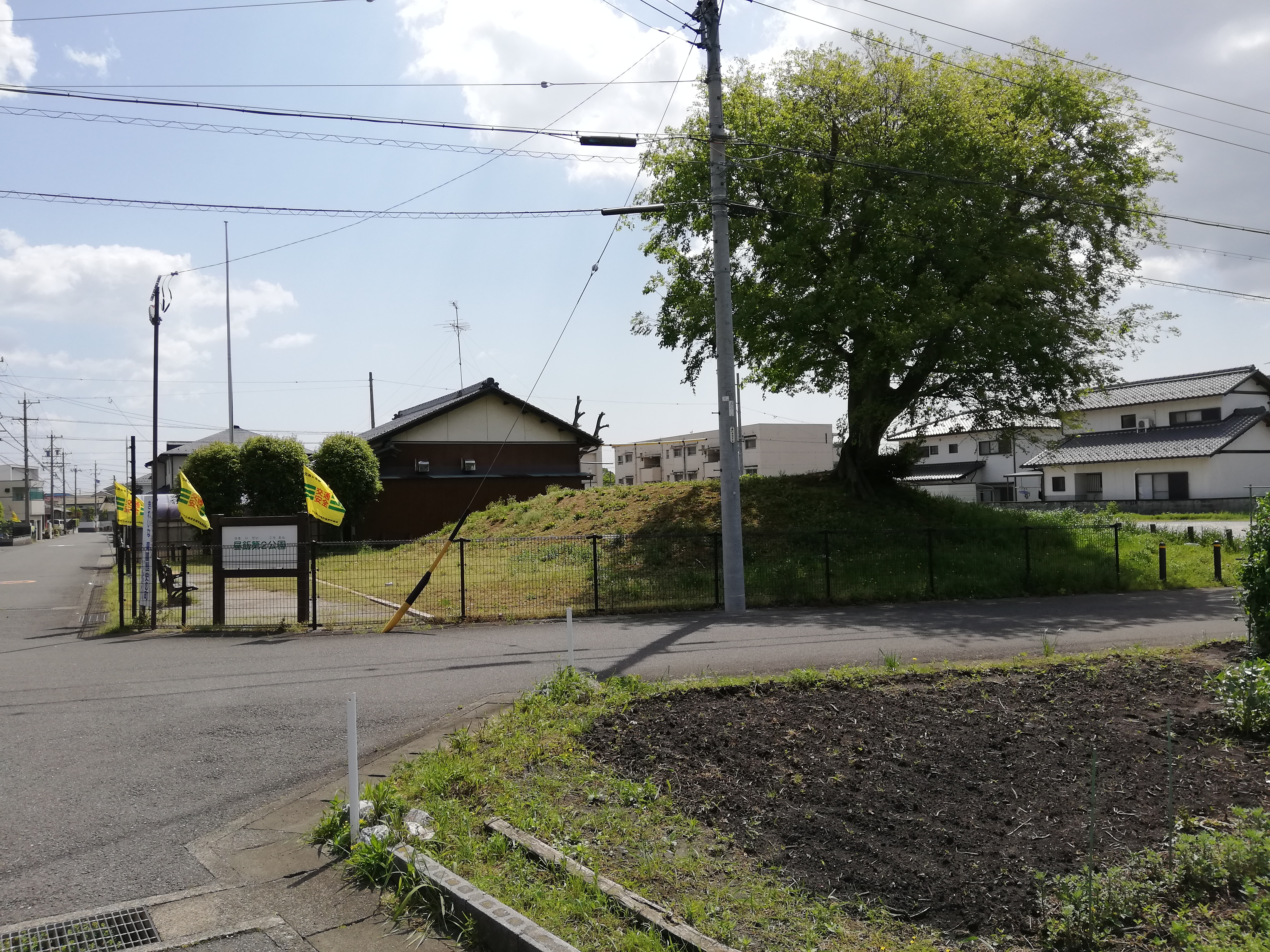 岐阜県大垣市にある大塚古墳群1号墳。昼飯第2公園となっている。